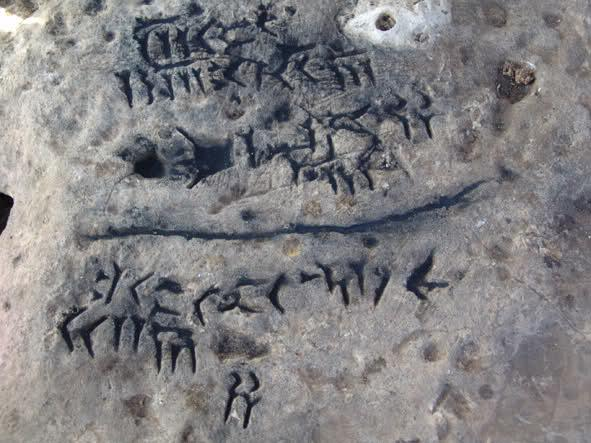 کتیبه خارک پیش از تخریب برگرفته از سایت تراورس